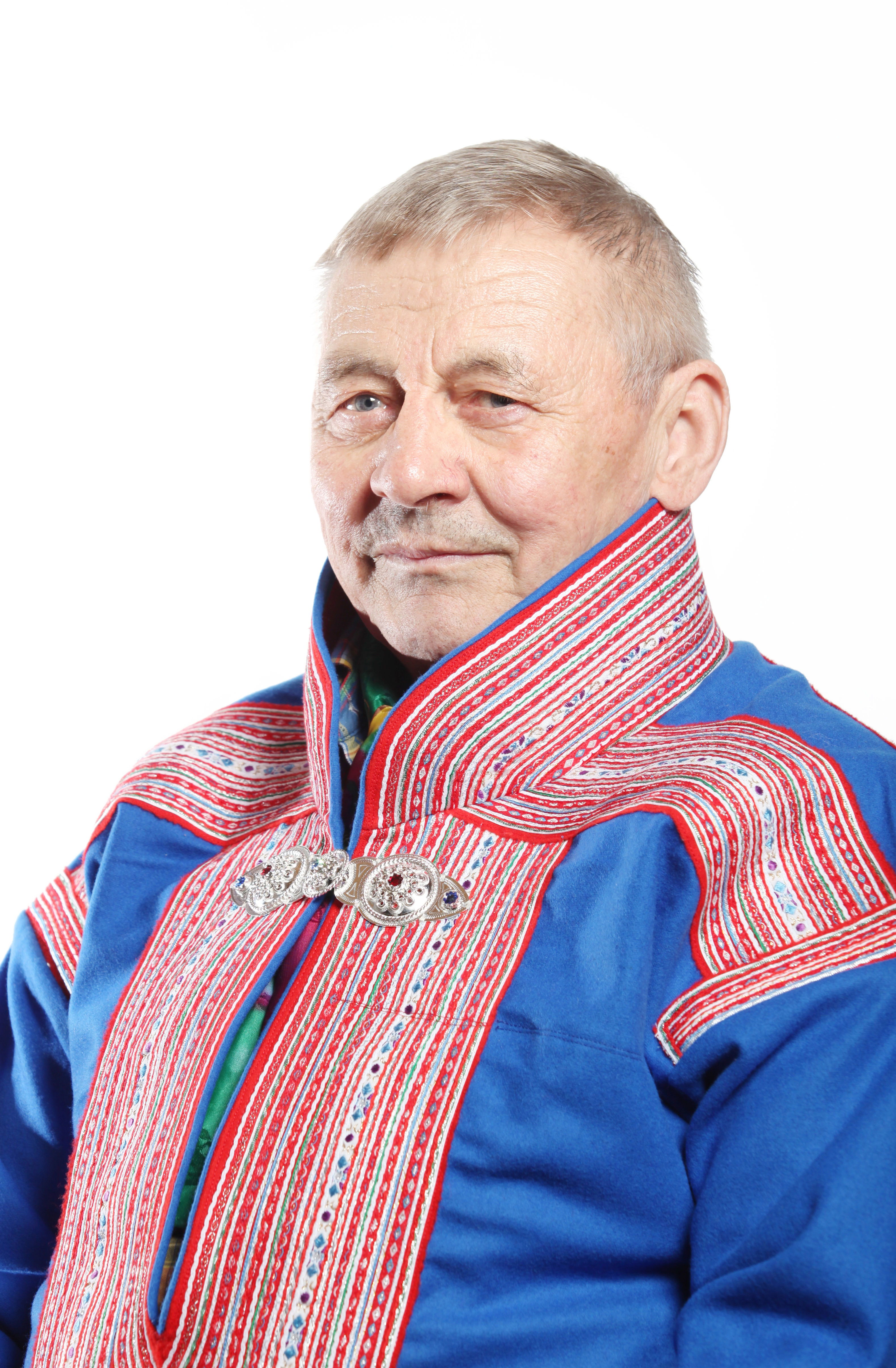 Medlem av næring- og kulturkomitéen. Foto: Kenneth Hætta / Sametinget.